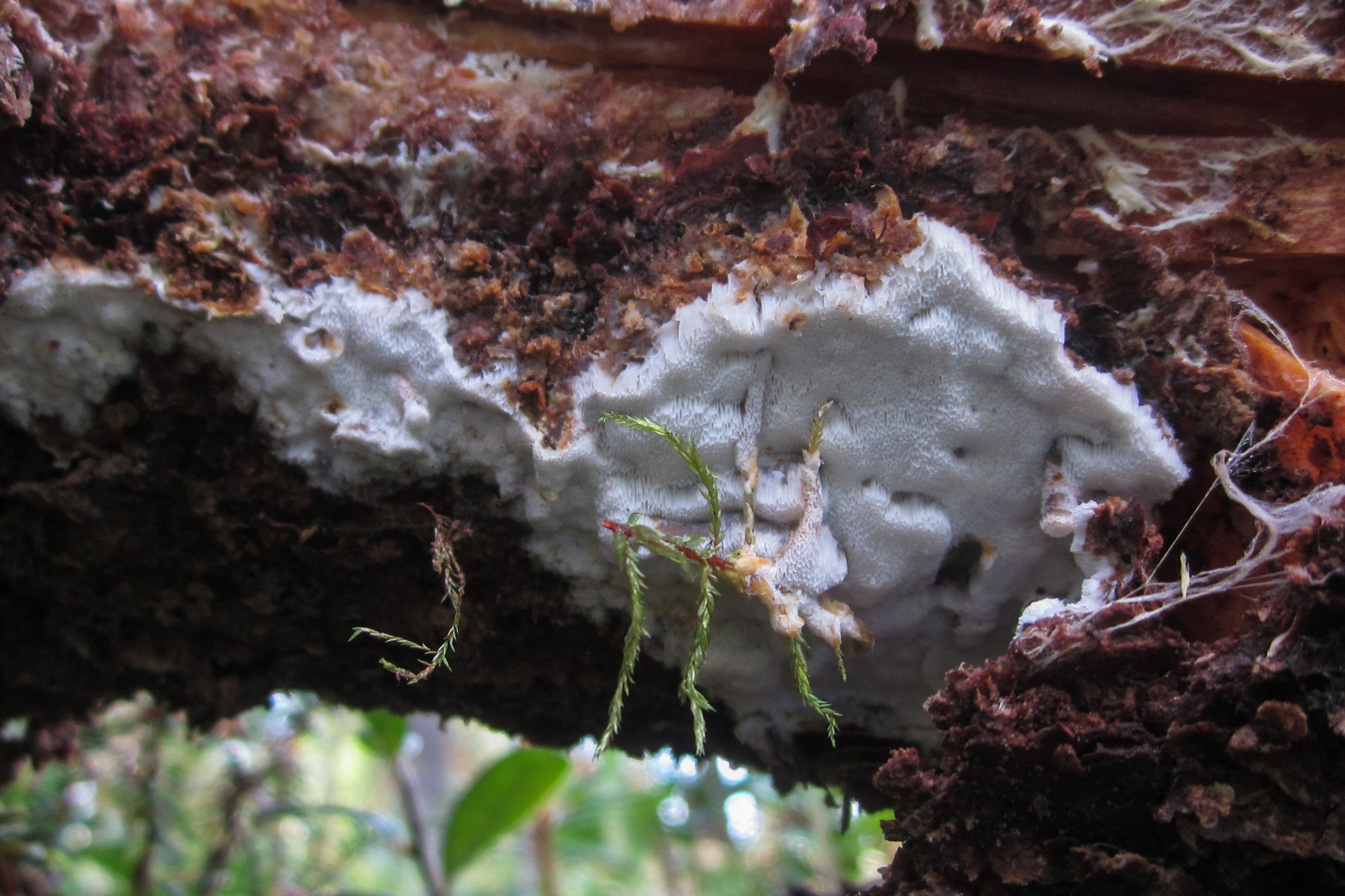 Kilporing